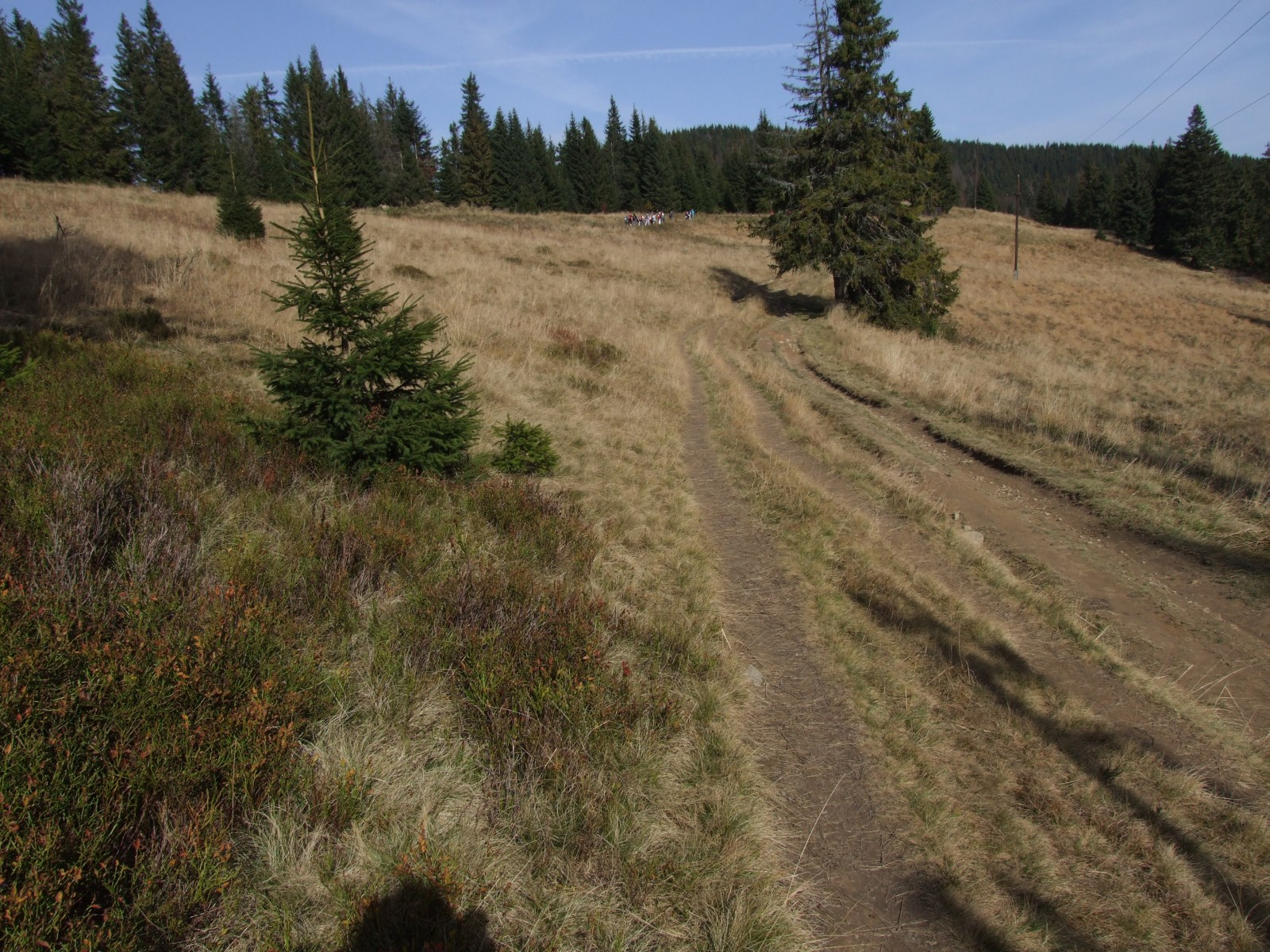 Polana Świderowa w Gorcach pod Turbaczem